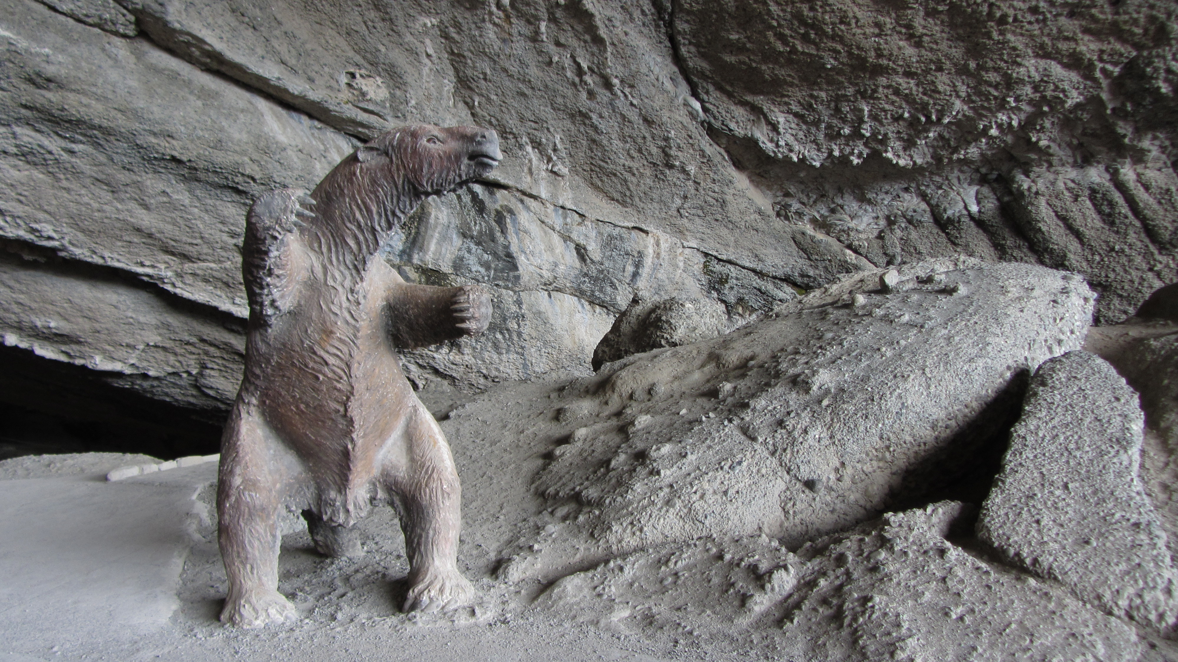 Réplica de un Milodón (Mylodon darwini) en el Monumento Natural Cueva del Milodón Provincia de Última Esperanza Magallanes, Chile Agosto de 2012